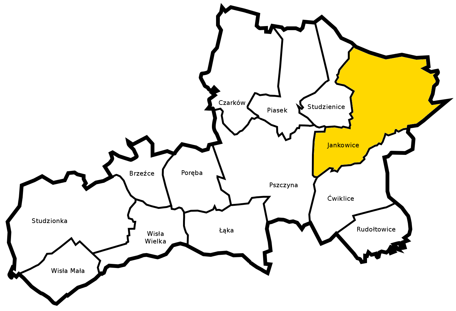 Gmina Pszczyna - sołectwo Jankowice